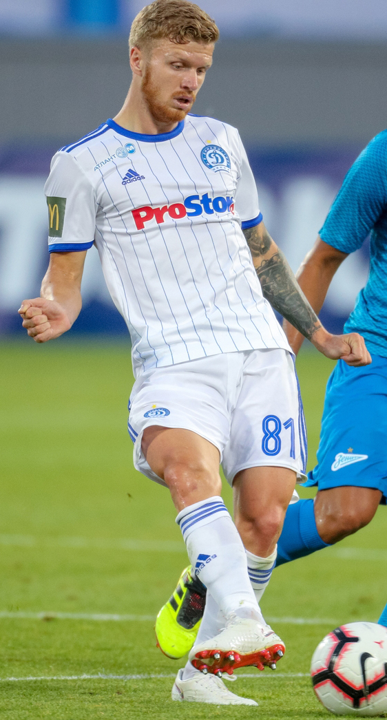 16.08.2018. Россия, Санкт-Петербург. Лига Европы УЕФА 2018/19, 3-й кв. раунд, «Зенит» — «Динамо» (Минск).